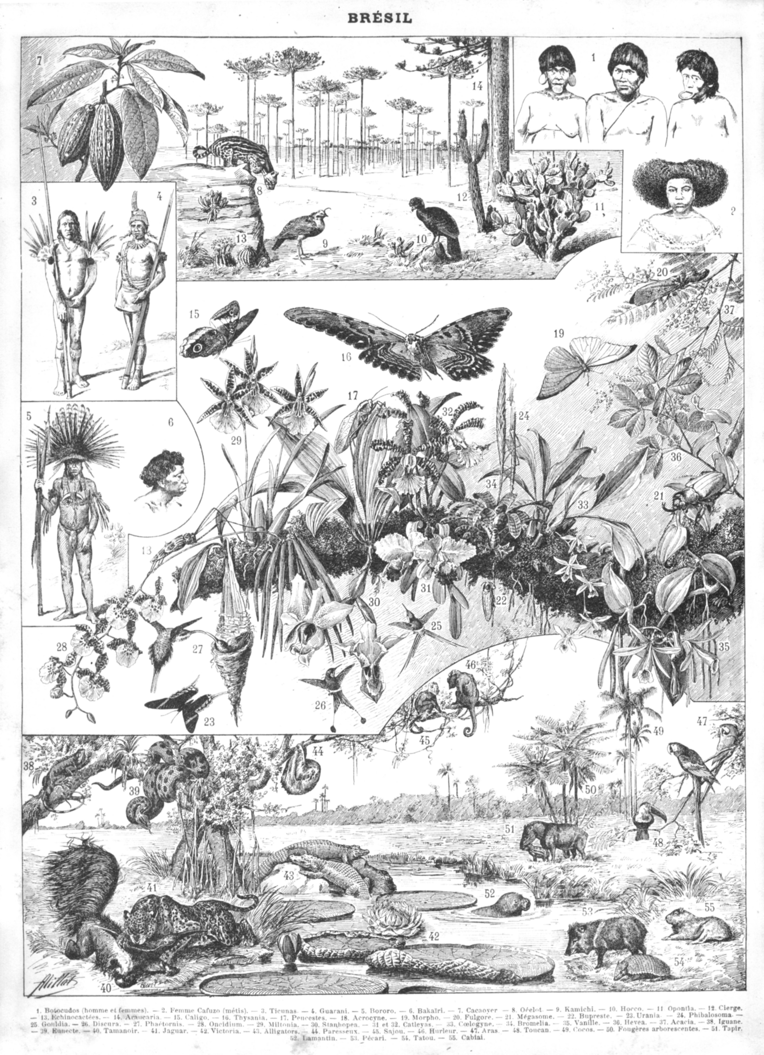 Imagem caracterizando o Brasil, em fins do século XIX, pela Enciclopédia Larousse, em França: índios, mestiços, exemplares da fauna e da flora do país